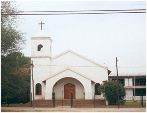 Parroquia Ntra Sra de Luján de Batán